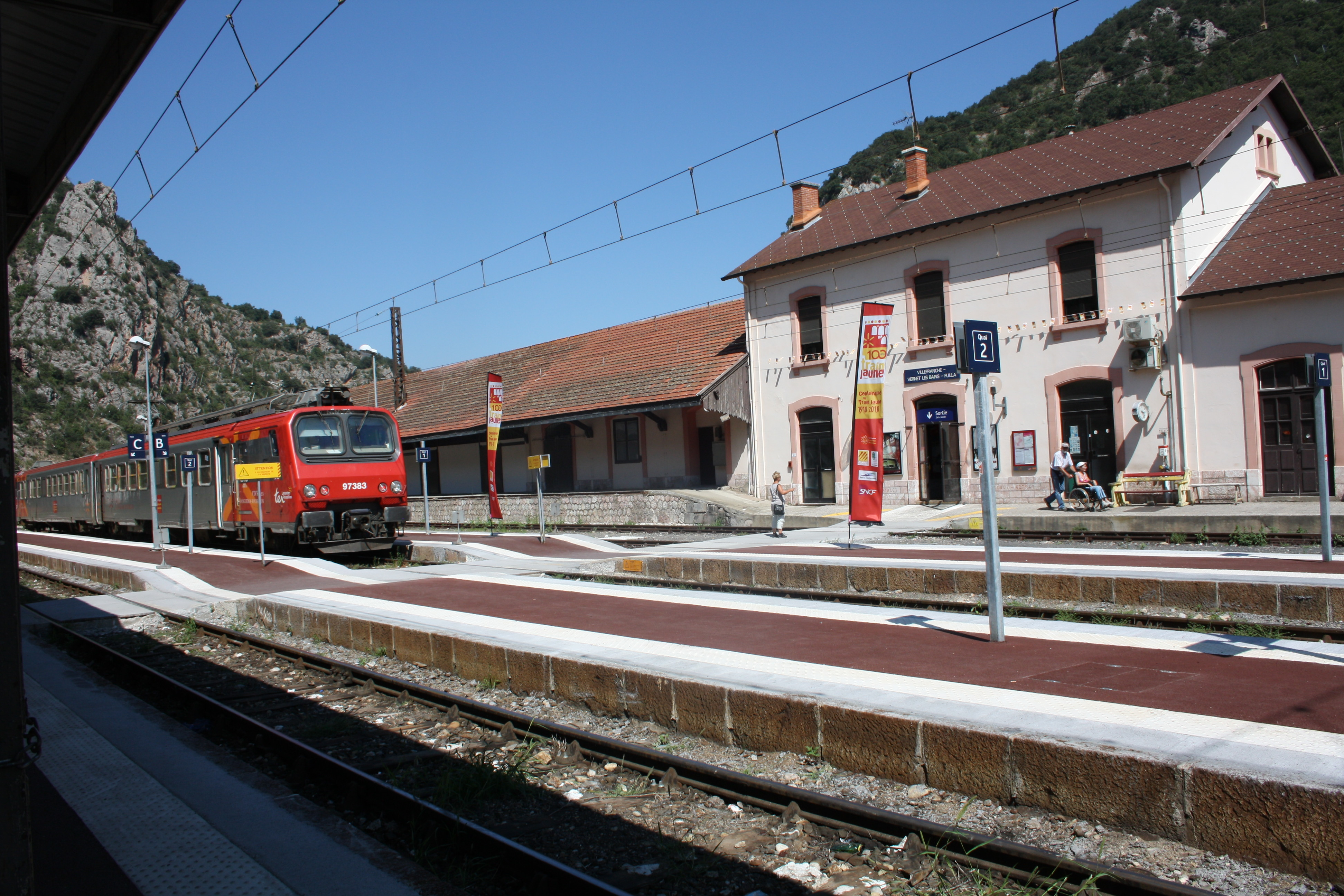 Photo de la gare de Villefranche Vernet Les Bains datée de 08-2010